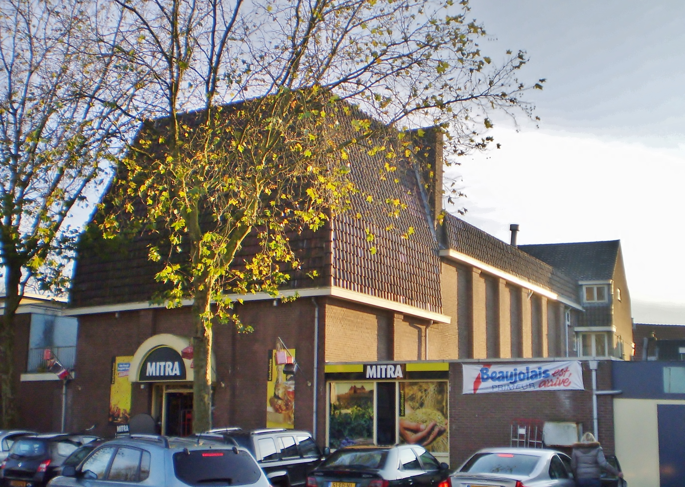 Achterzijde voormalige Flora-bioscoop